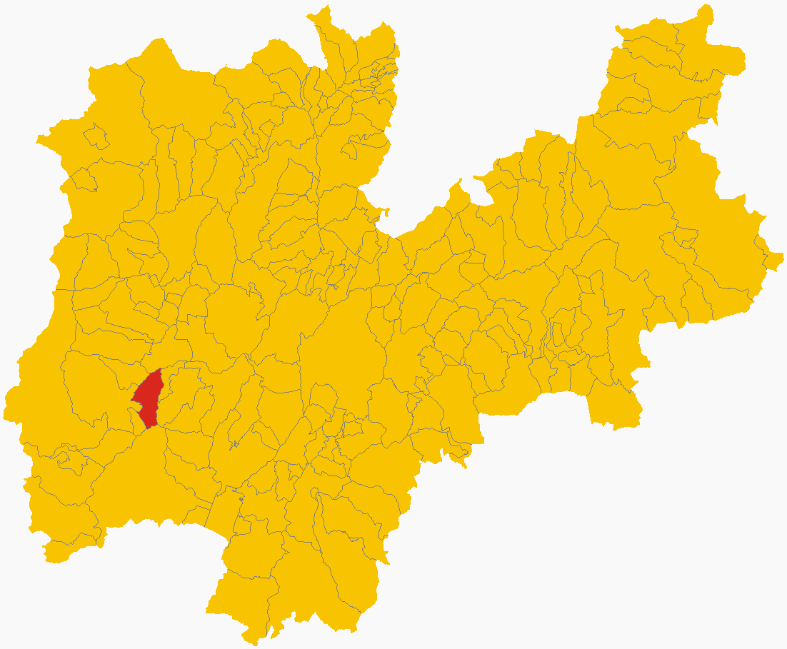 Posizione del comune di Borgo Lares nella provincia di Trento, in Italia.